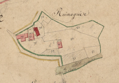 Riunoguers en el Cadastre napoleònic del 1812 (Arxius Departamentals dels Pirineus Orientals)